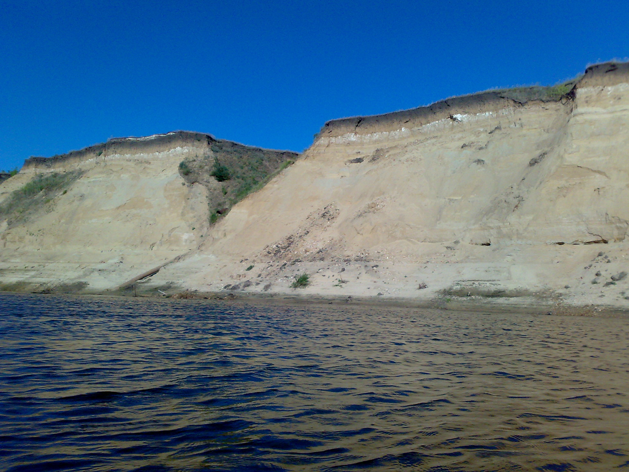 Luchnovsky